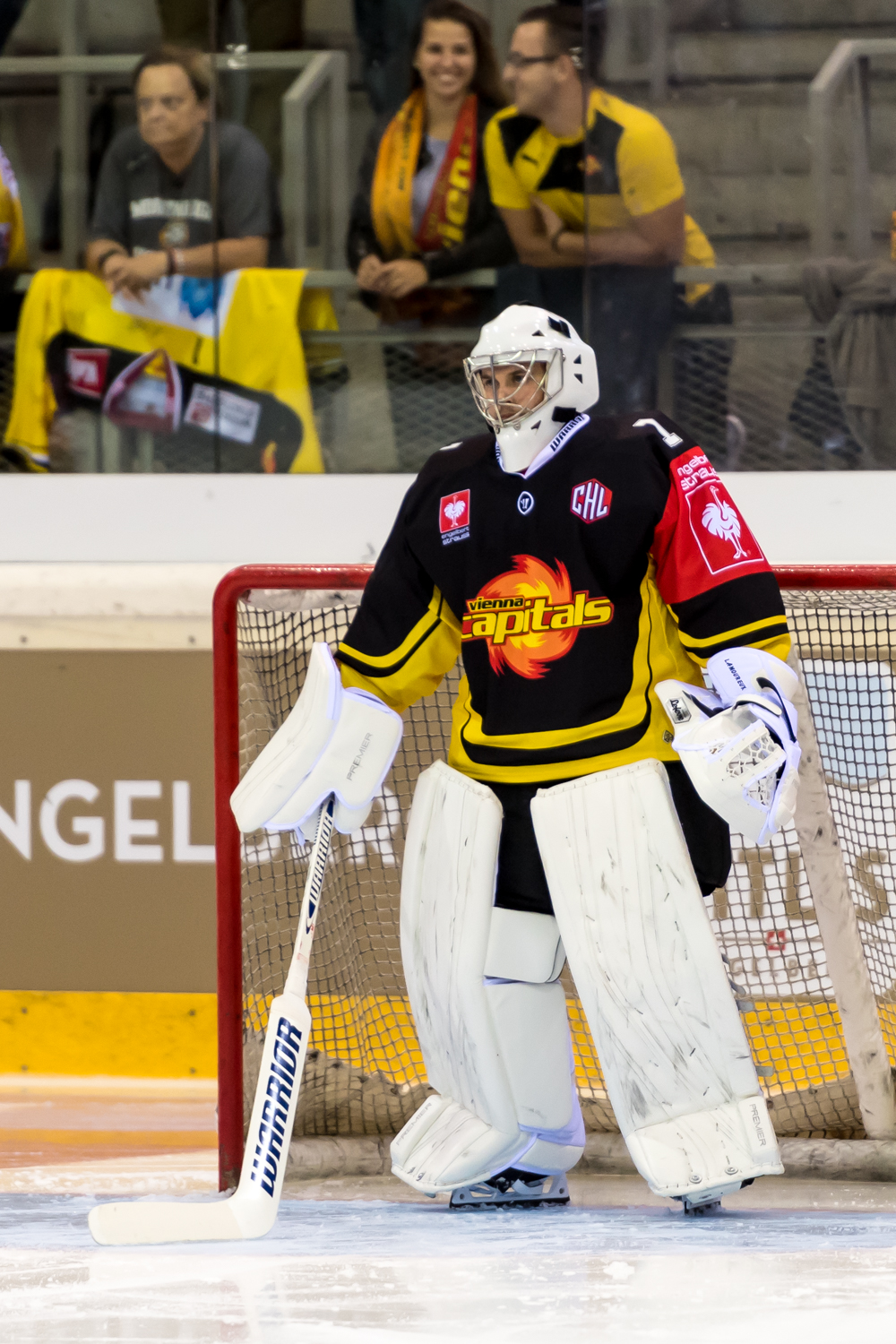 Champions Hockey League - Vienna Capitals vs Skelleftea AIK am 18.08.2016. Bild zeigt Goalkeeper Jean-Philippe Lamoureux (VIC).